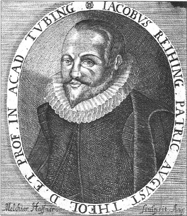 Jacob Reihing, Kupferstich nach einer älteren Vorlage.